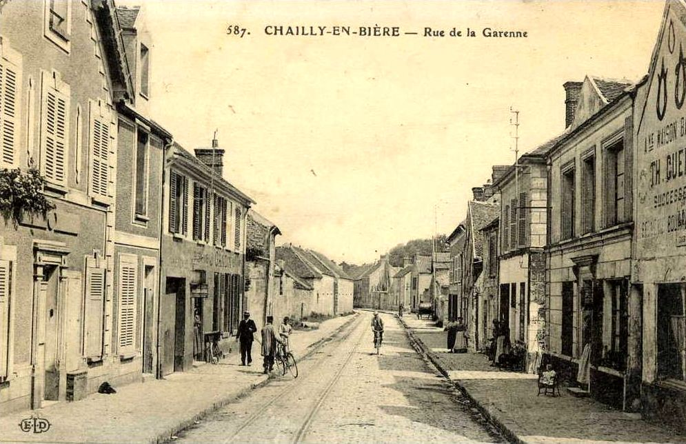 Les rails du Tramway Sud Seine-et-Marne dans la rue de la Garenne (actuelle rue de Melun).